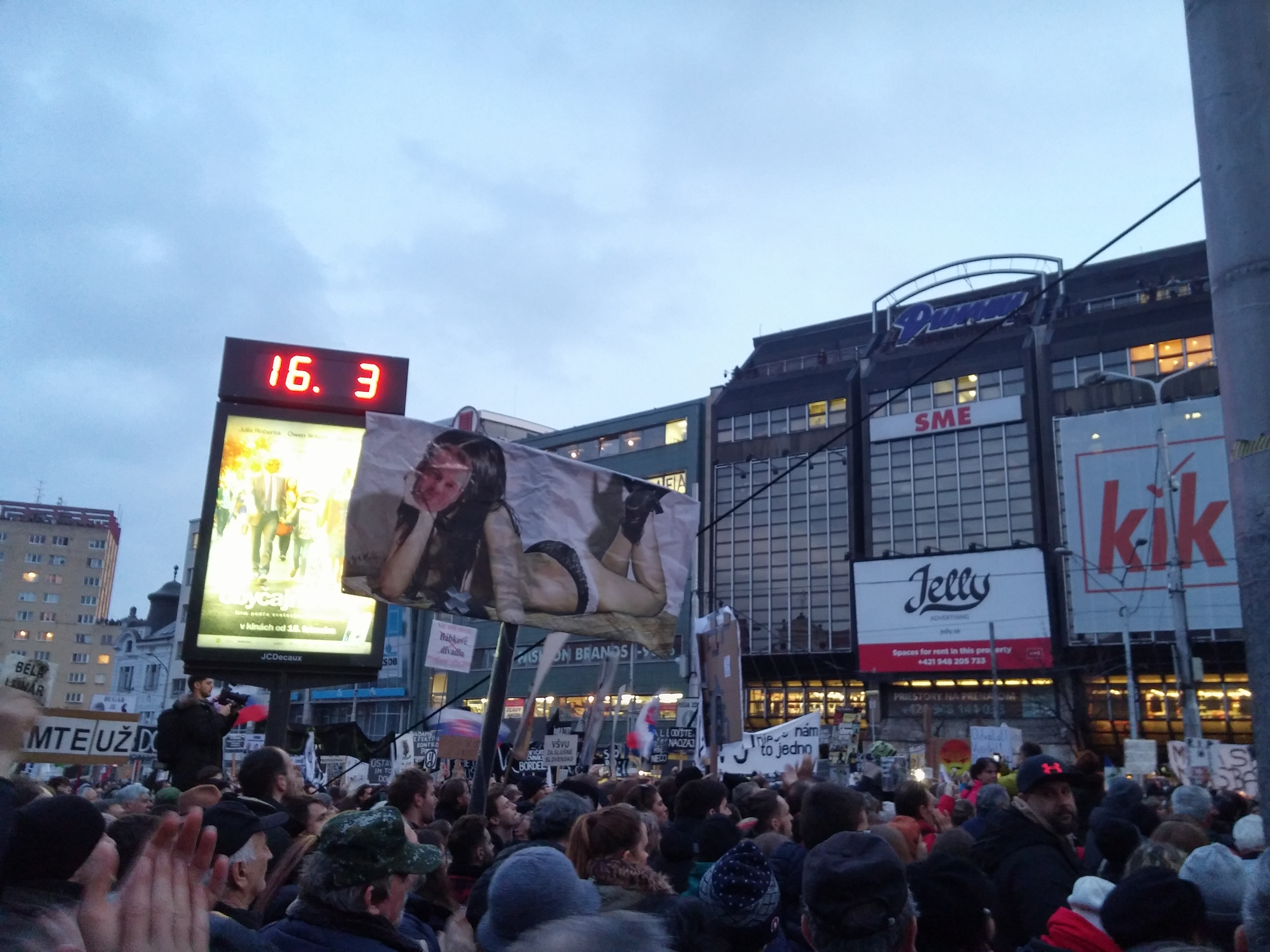 Anti government protests in Bratislava, Slovakia on March 16, 2018 at SNP Square